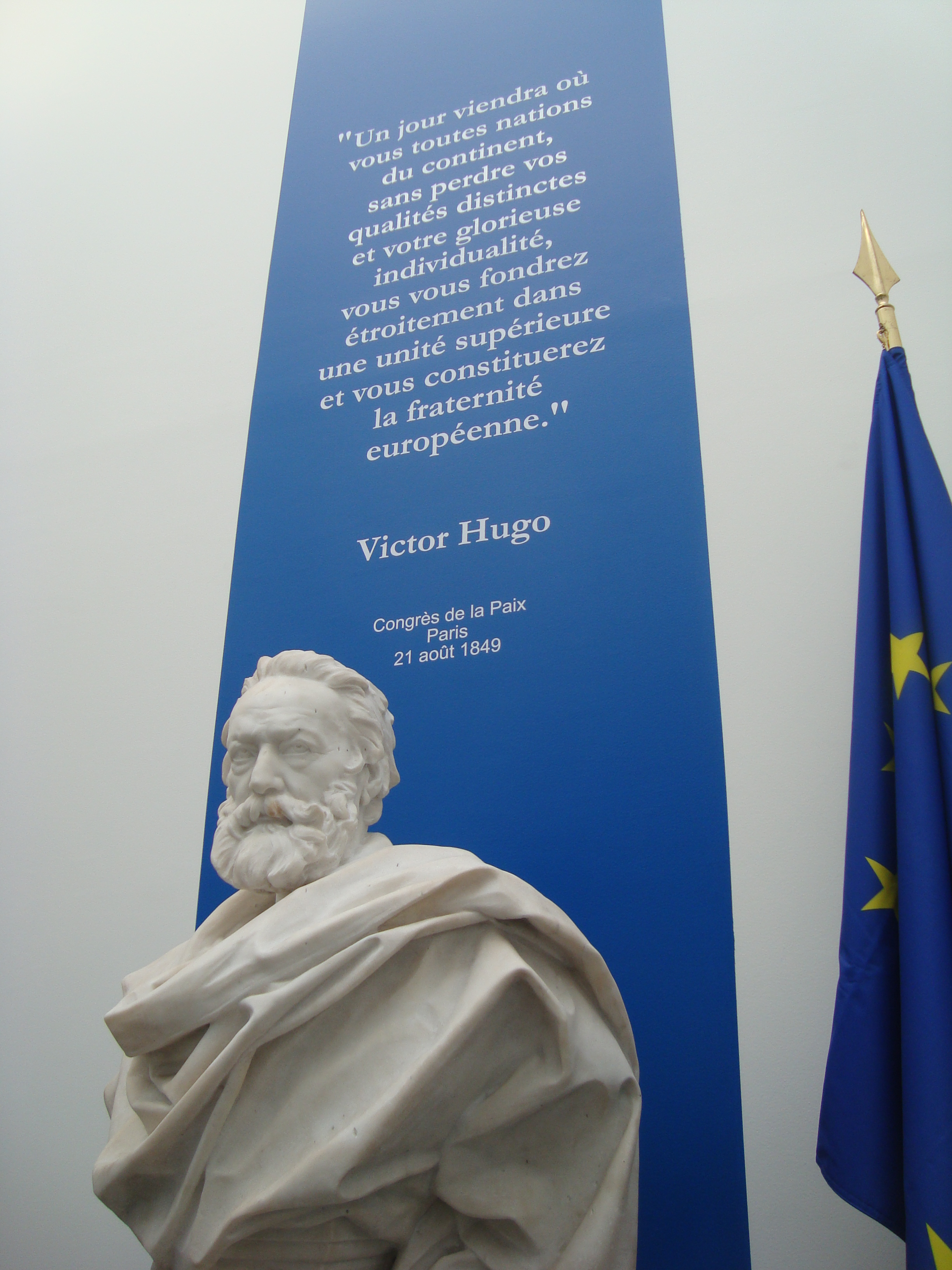 Buste de Victor Hugo, au Palais Bourbon (Assemblée Nationale), à Paris. En arrière-plan une citation de Victor Hugo extraite du discours prononcé au Congrès de la Paix le 21 août 1849 : "Un jour viendra où vous toutes nations du continent sans perdre vos qualités distinctes et votre glorieuse individualité, vous vous fondrez étroitement dans une unité supérieure et vous constituerez la fraternité européenne".